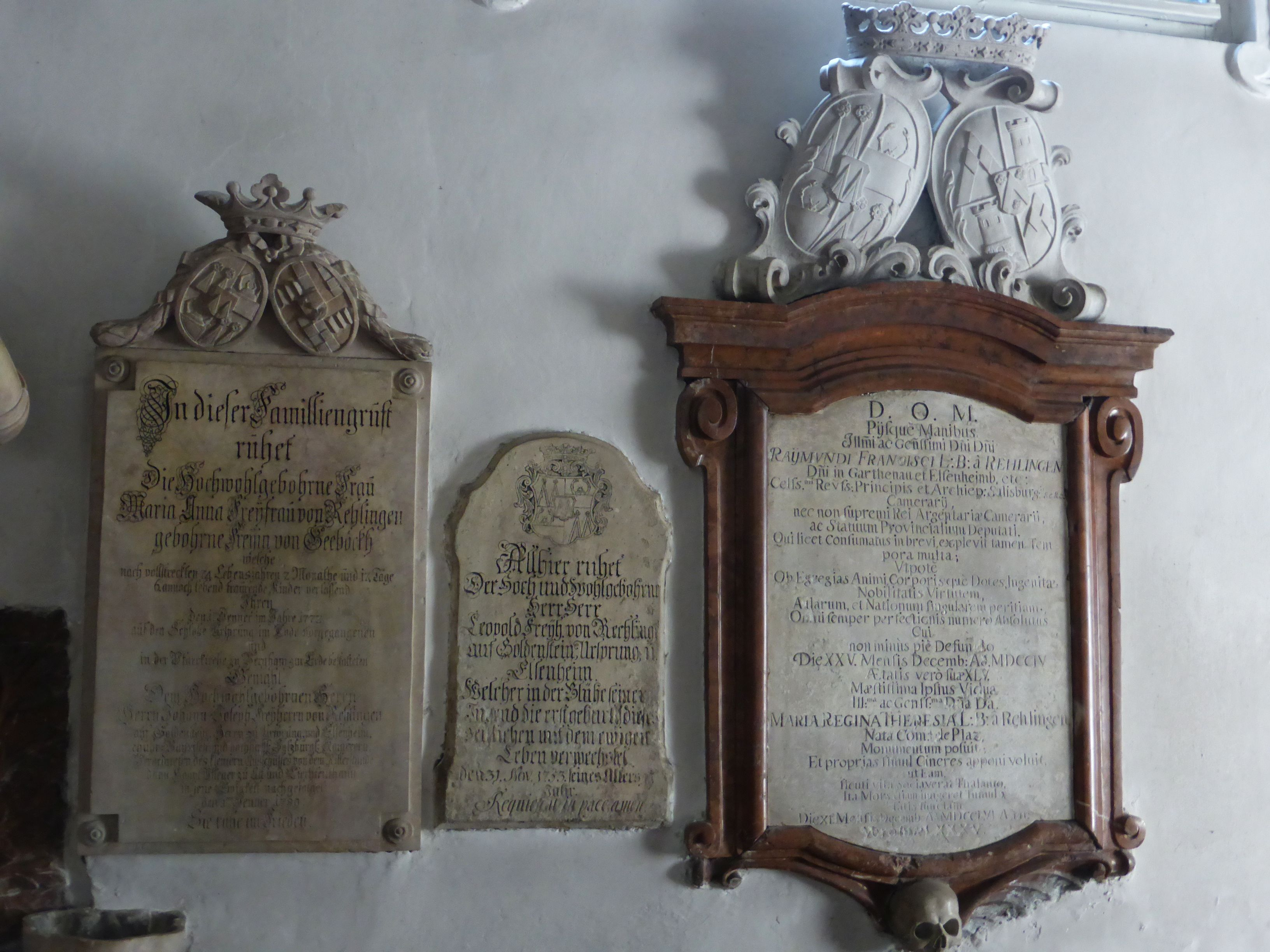 Epitaph der von Rehlingen im Kloster St. Peter (Salzburg)